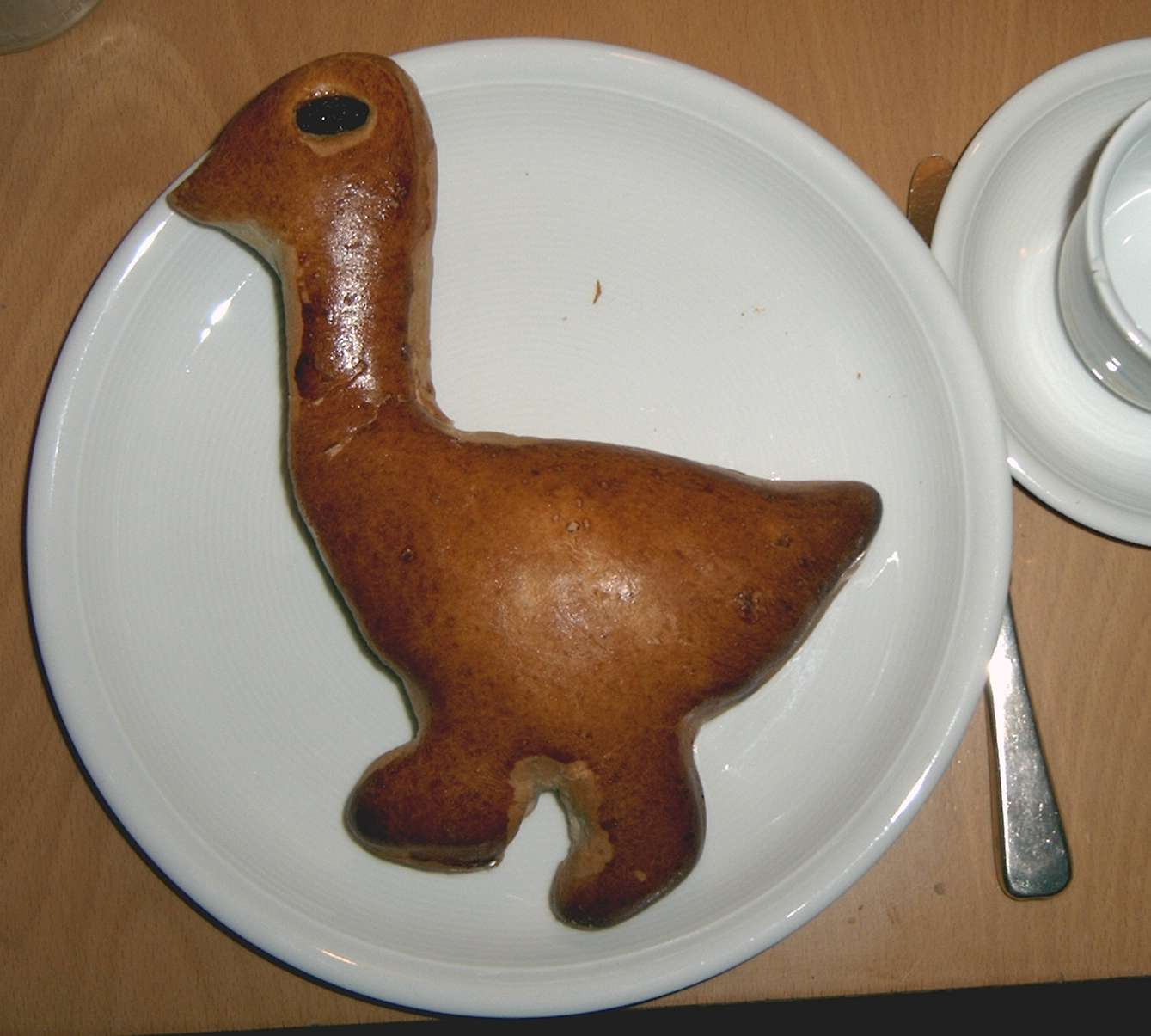 Gebäck speziell zum 11.November - St.Martin. Martinsgans oder Weck-Dino genannt.